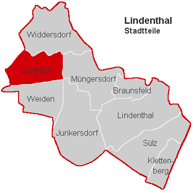 Lagekarte Lövenich im Stadtbezirk Köln-Lindenthal